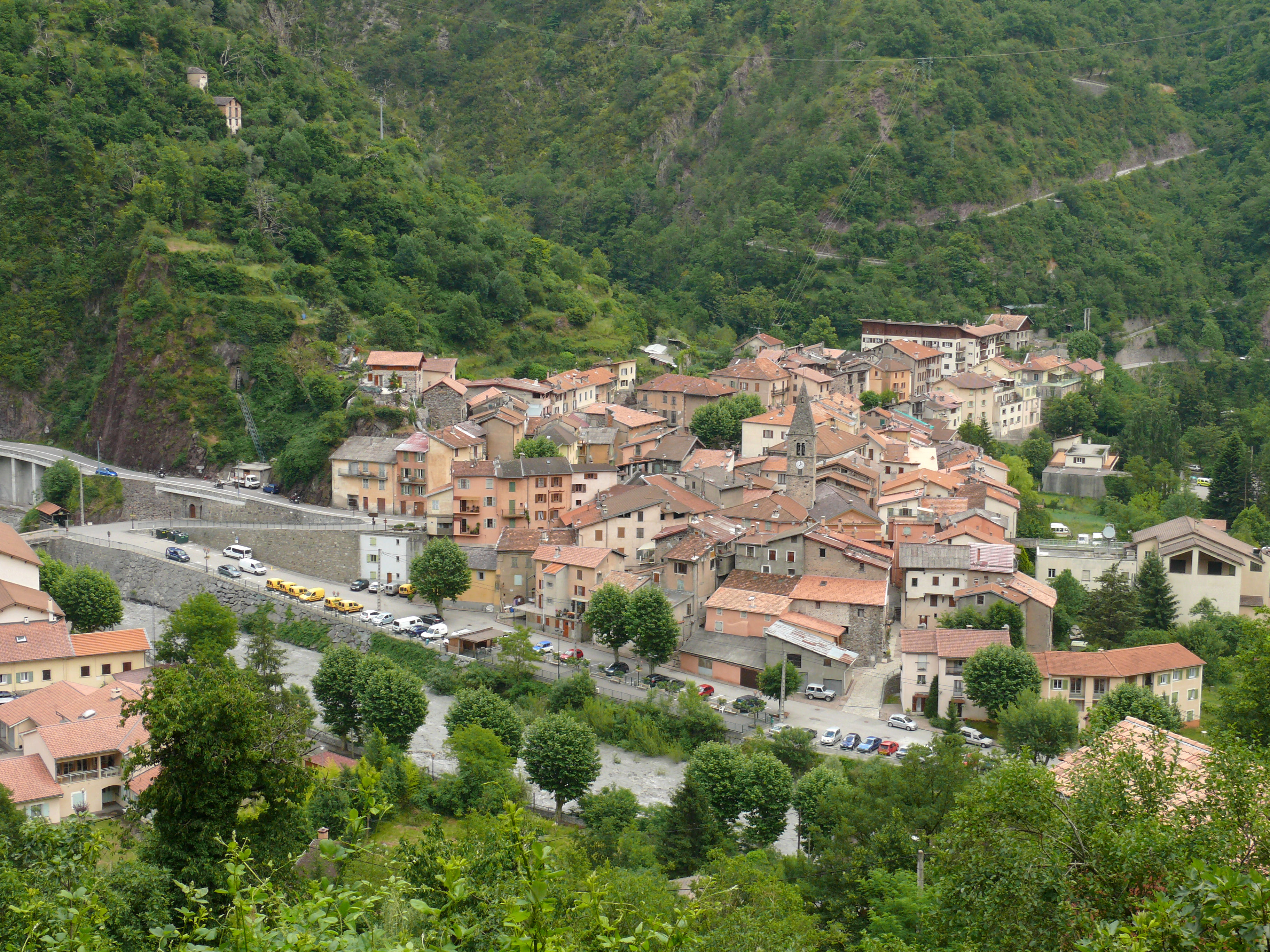 aint-Sauveur-sur-Tinée - Vue d'ensemble depuis la route de Roubion